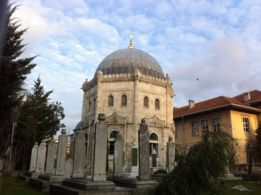 V. Mehmed Reşat Türbesi, Eyüp